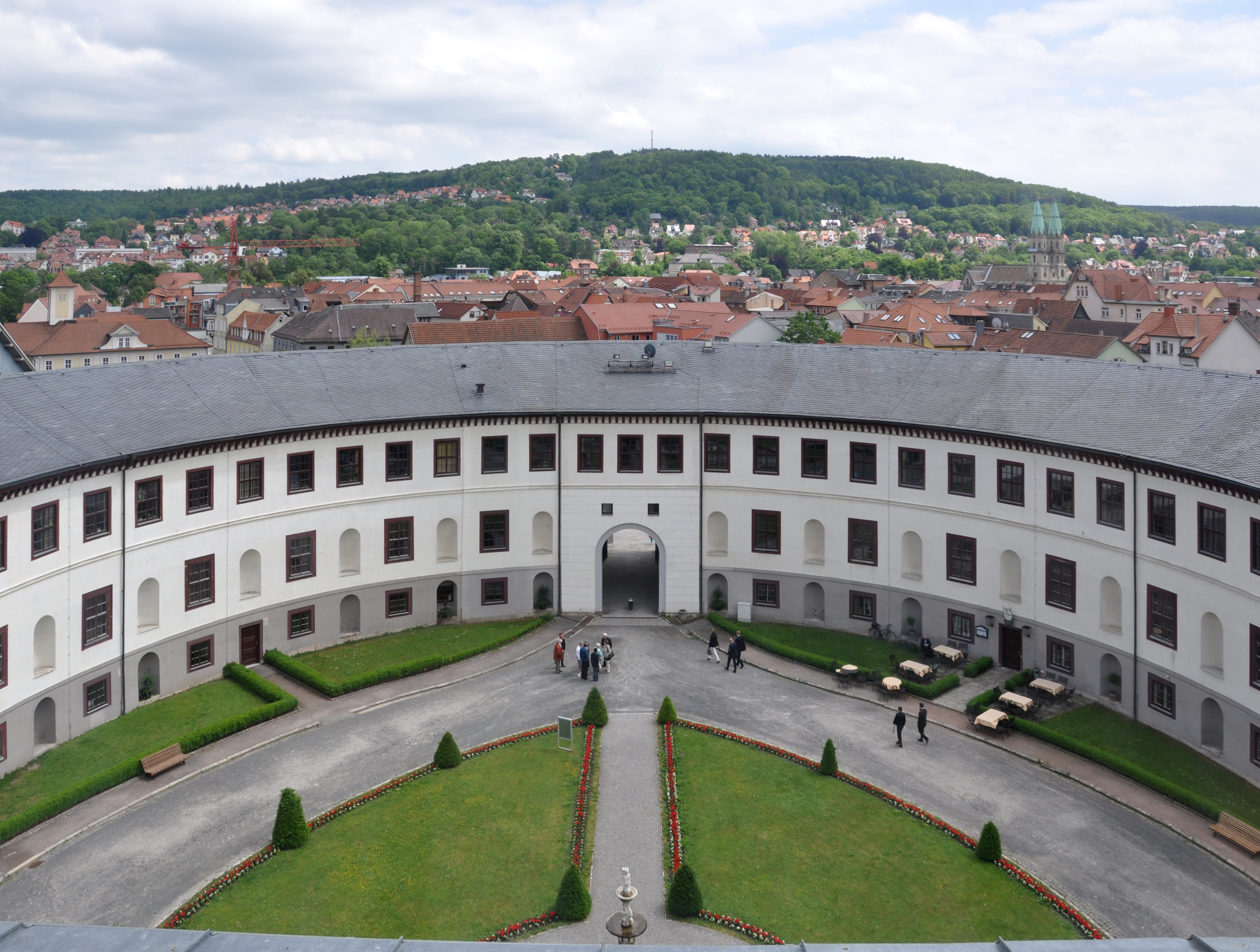 Meiningen, Schloss Elisabethenburg, Blick vom Schloss auf den Innenhof und den Rundbau (Stadtverwaltung, bis 1920 Sitz der Ministerien von Sachen-Meiningen)